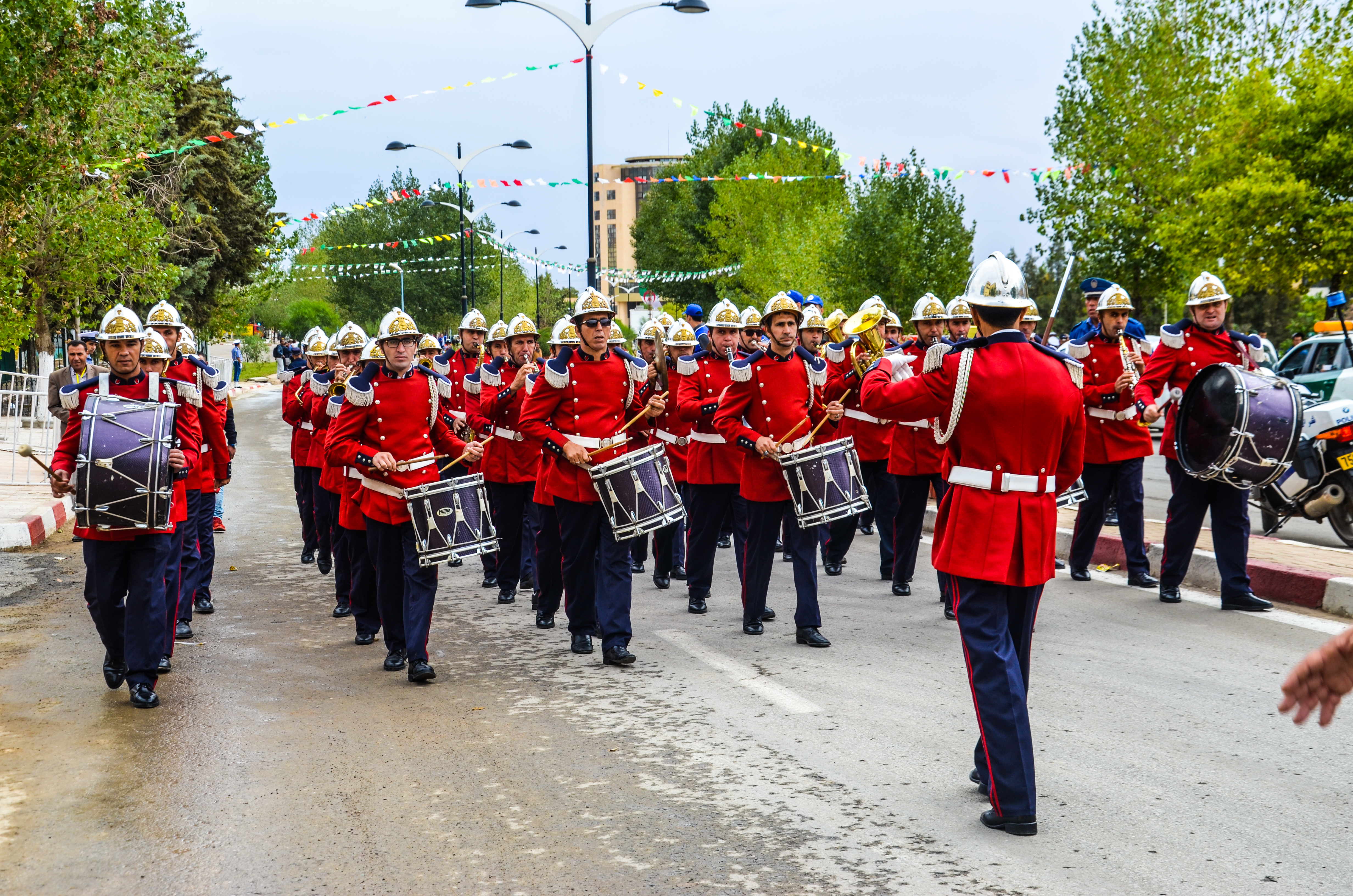 SPECTACLE AU SALON DU CHEVAL 2016 This is an image from Algeria